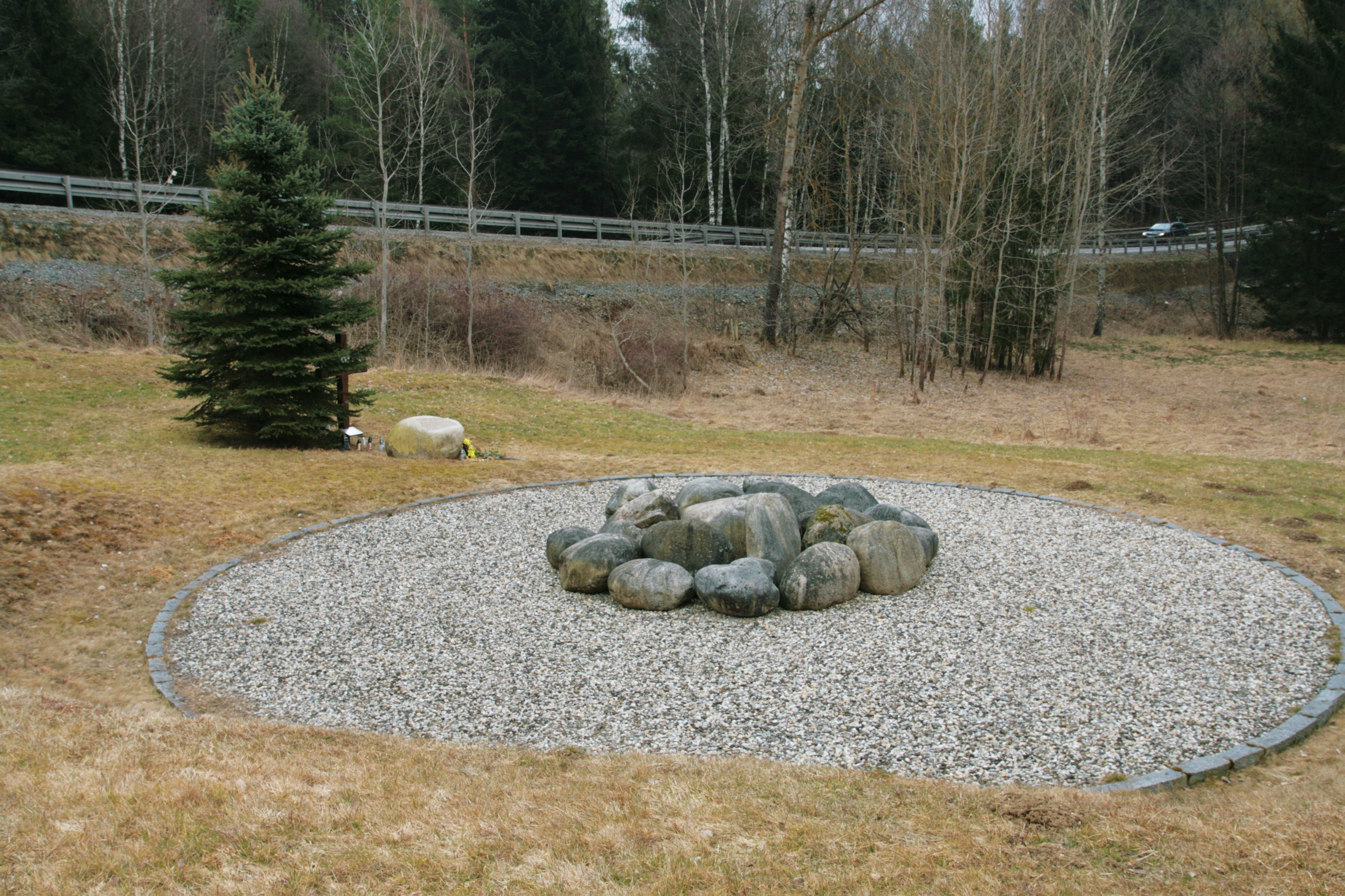 Osada Nažidla, součást vesnice Suchdol, části obce Bujanov. Pomník tragické nehody autobusu z 8. března 2003 při silnici E55.